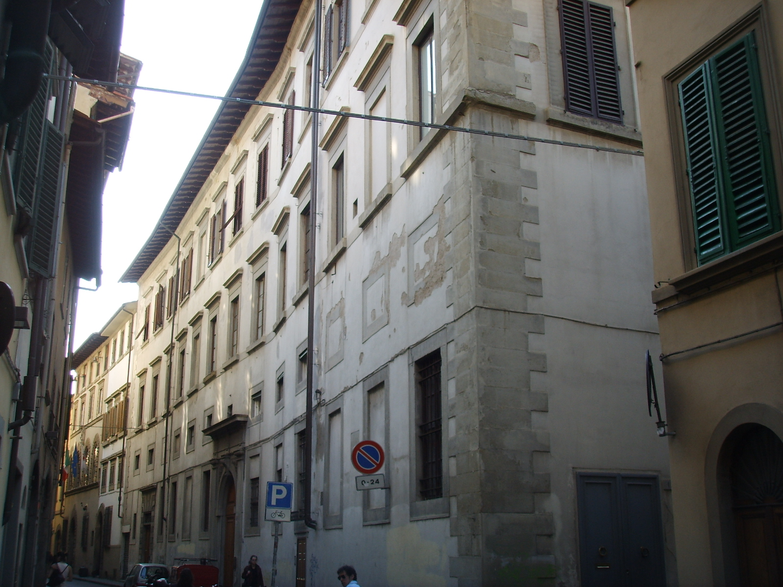 Palazzo_caccini in Florence